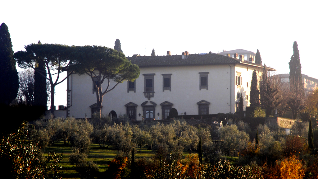 Villa Medicea di Marignolle, Florence, Italy. A view from Via del Ferrone.